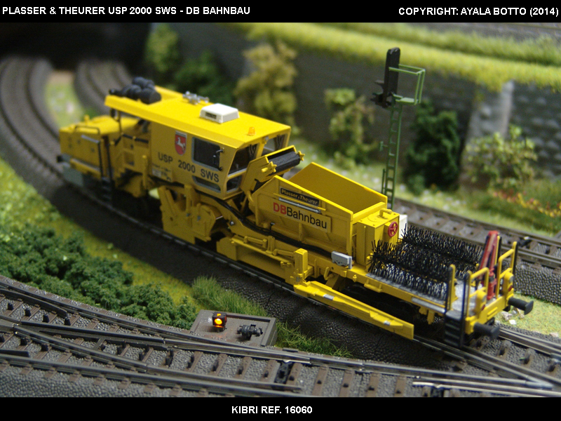 Plasser & Theurer USP 2000 SWS DB Bahnbau Kibri 16060 Modelismo Ferroviario Model Trains Modelleisenbahn modelisme ferroviaire ferromodelismo